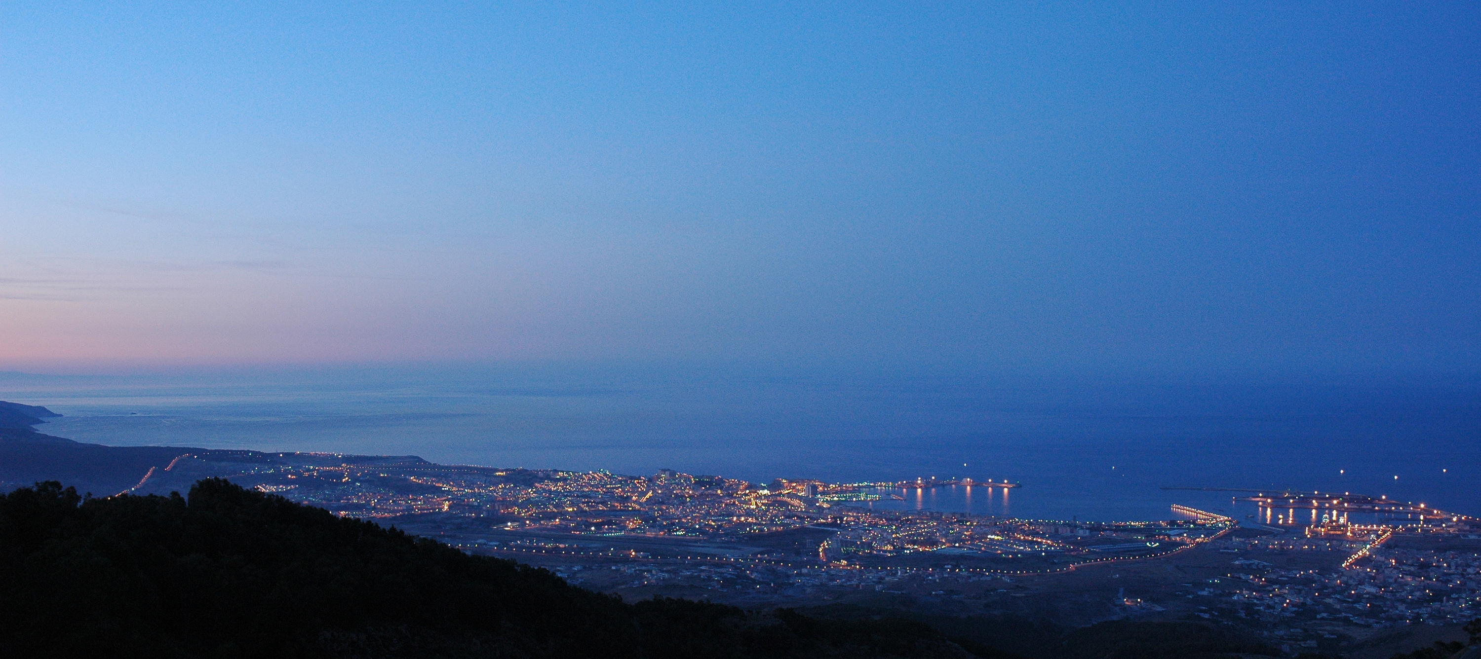 Hay que repetir las tomas y buscar una tarde de poniente, quien se apunta. Las luces del perímetro nos marcan nuestros doce km cuadrados. Nikon D70